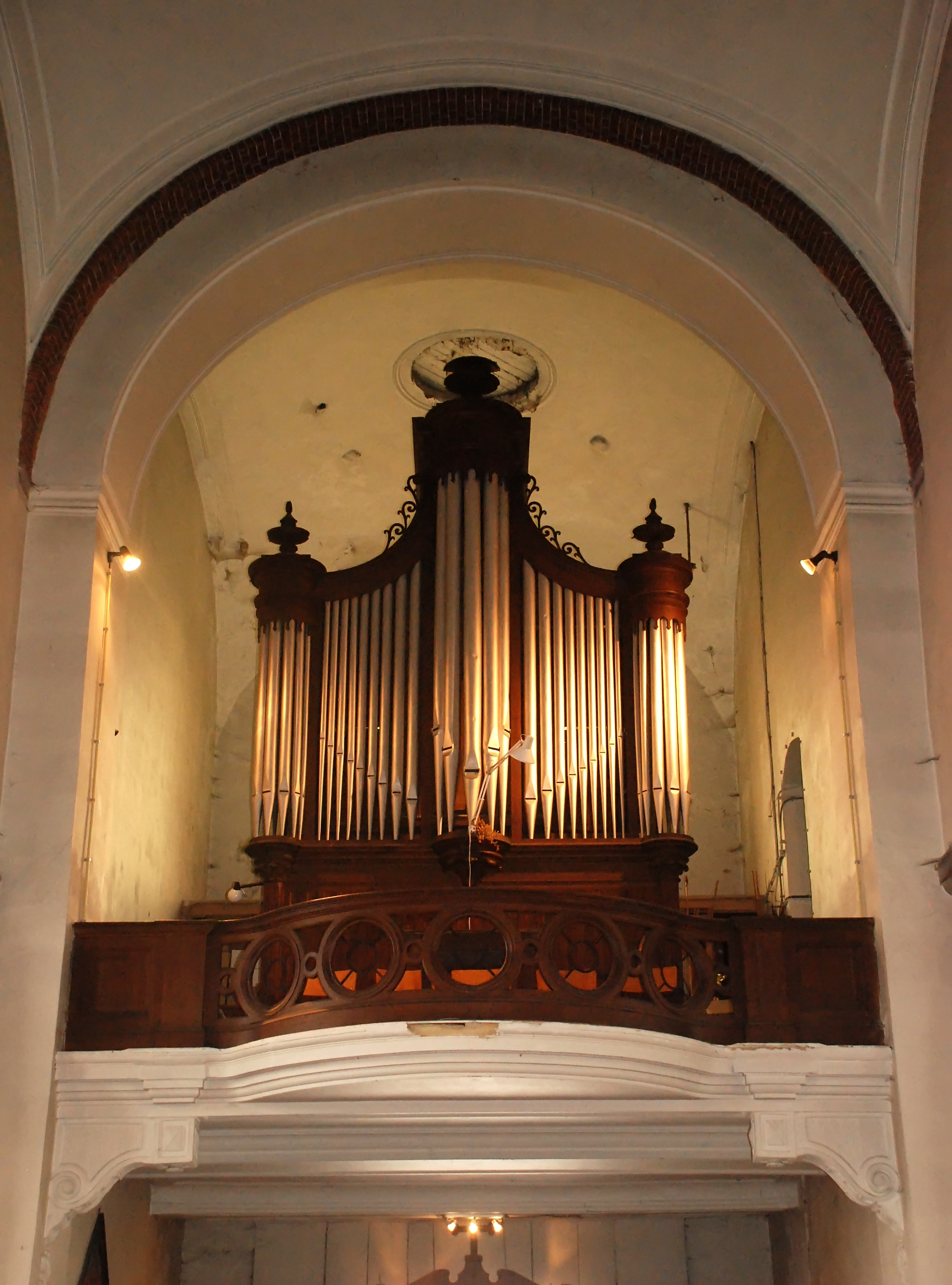 Belgique - Brabant wallon - Genappe - Baisy-Thy - Église Saint-Hubert - Orgues